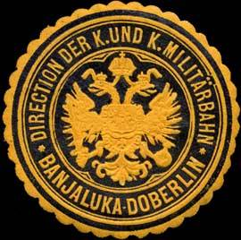 Sealing stamp Title: Direction der K. und K. Militärbahn Banjaluka-Doberlin Description: Eisenbahn, gelb, schwarz, geprägt Place: Banjaluka/Doberlin size: 4 cm